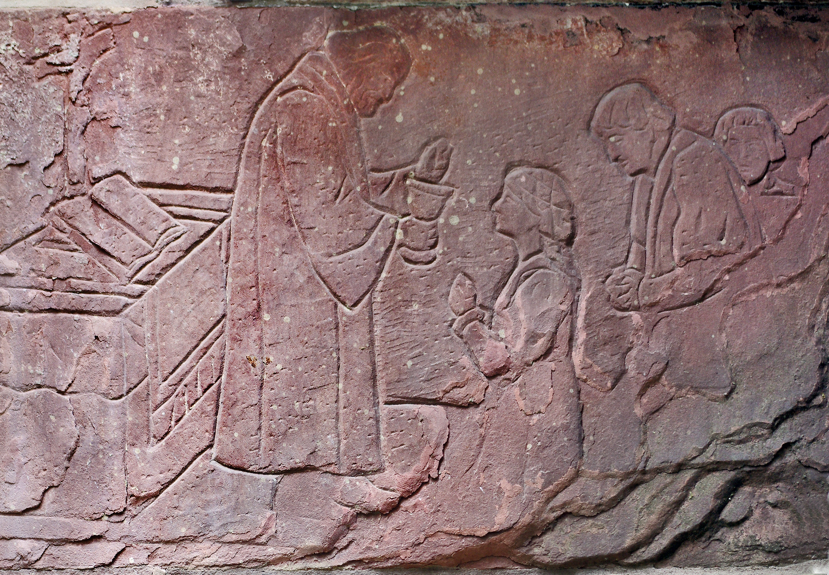 Reformationsdenkmal an der Südfassade der Hospitalkirche in Stuttgart, Wandrelief Nr. 3 (Nummerierung siehe file:Hospitalkirche, 002.jpg): Austeilung des Abendmahls.